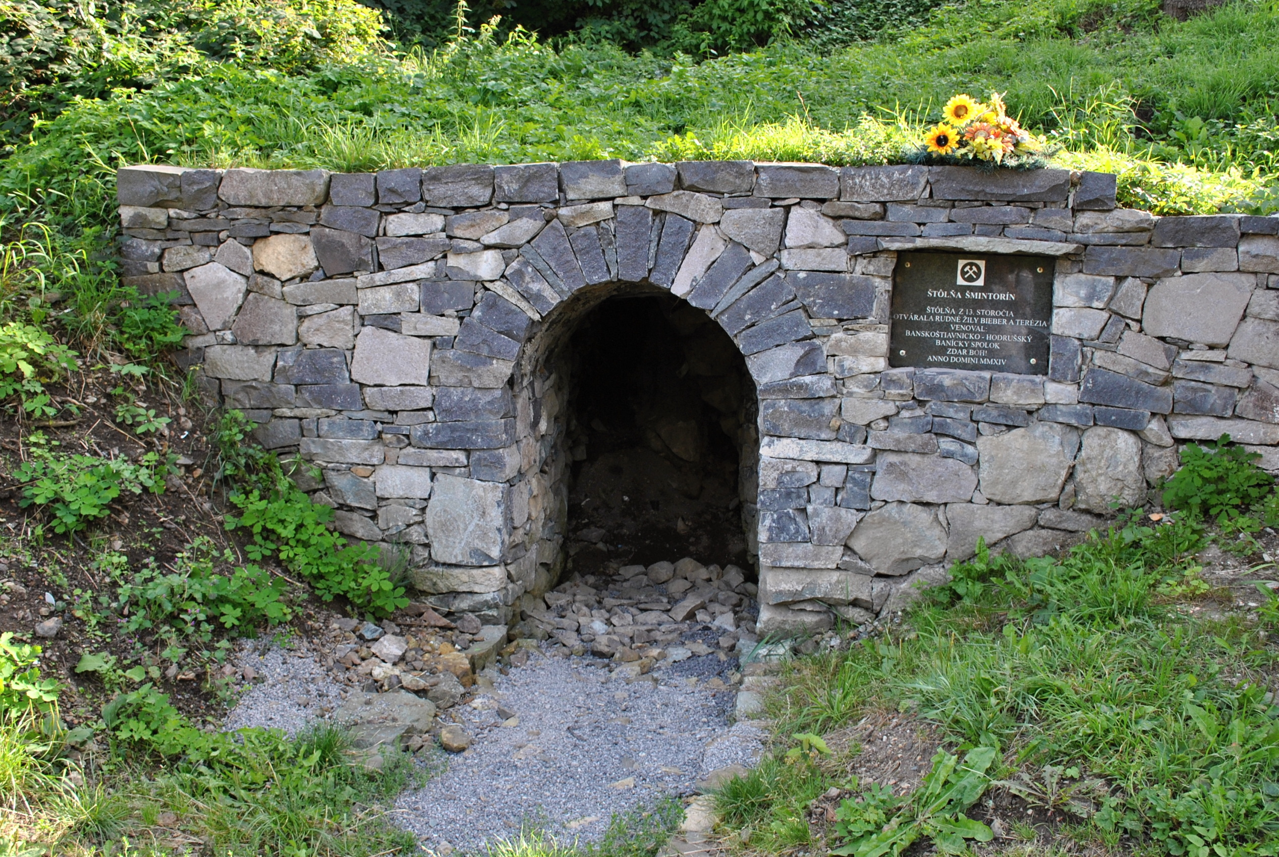 Banská Štiavnica - ústie štôlne Šmintorín - stav v roku 2015